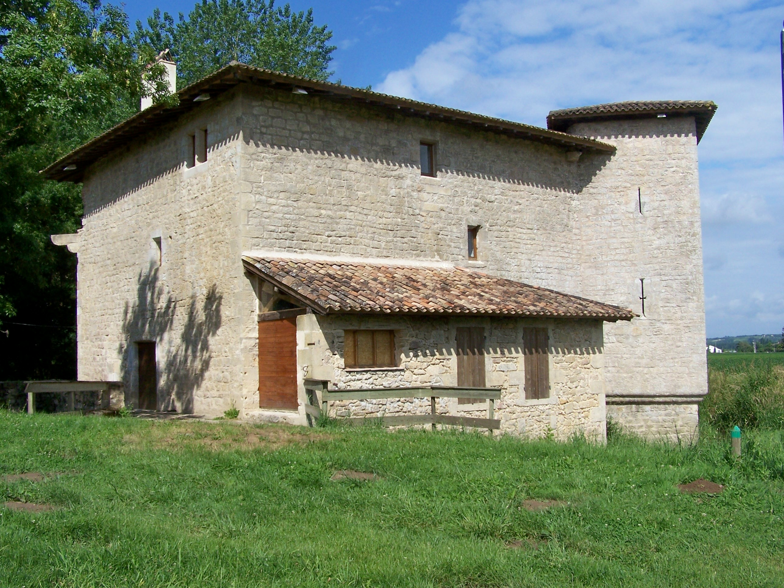 Le moulin de Piis à Bassanne, Gironde, France